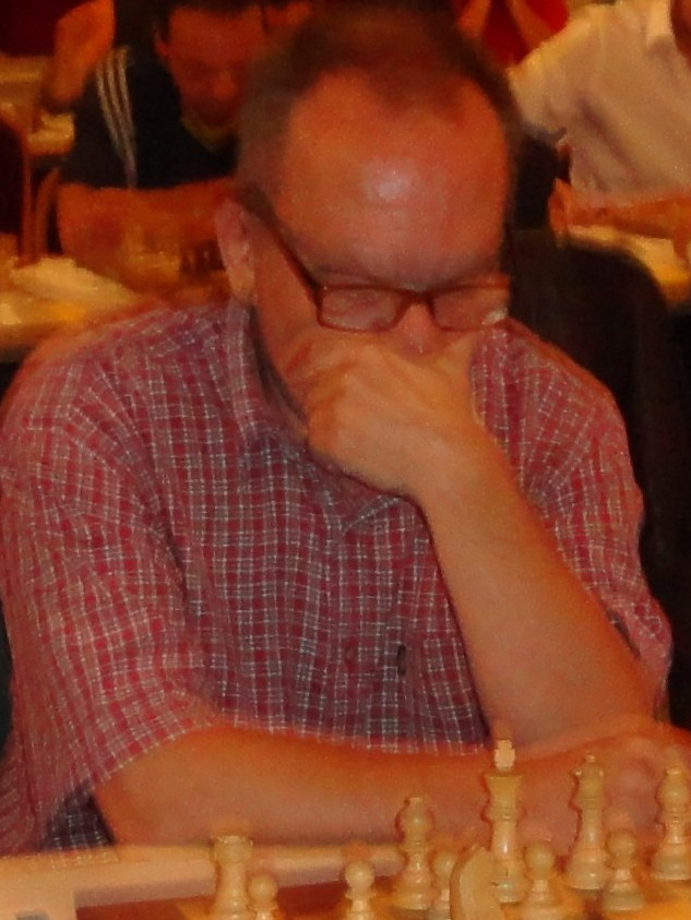 Emir Dizdarevic, Vienna Chess Open 2015 in Wien.